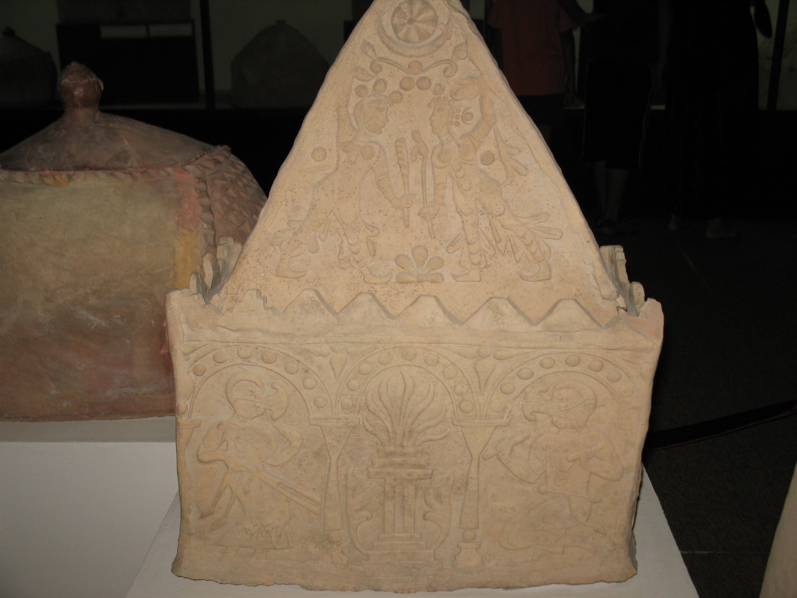 Sogdian ossuary (funeral container), 6th-7th centuries, Samarkand, Uzbekistan